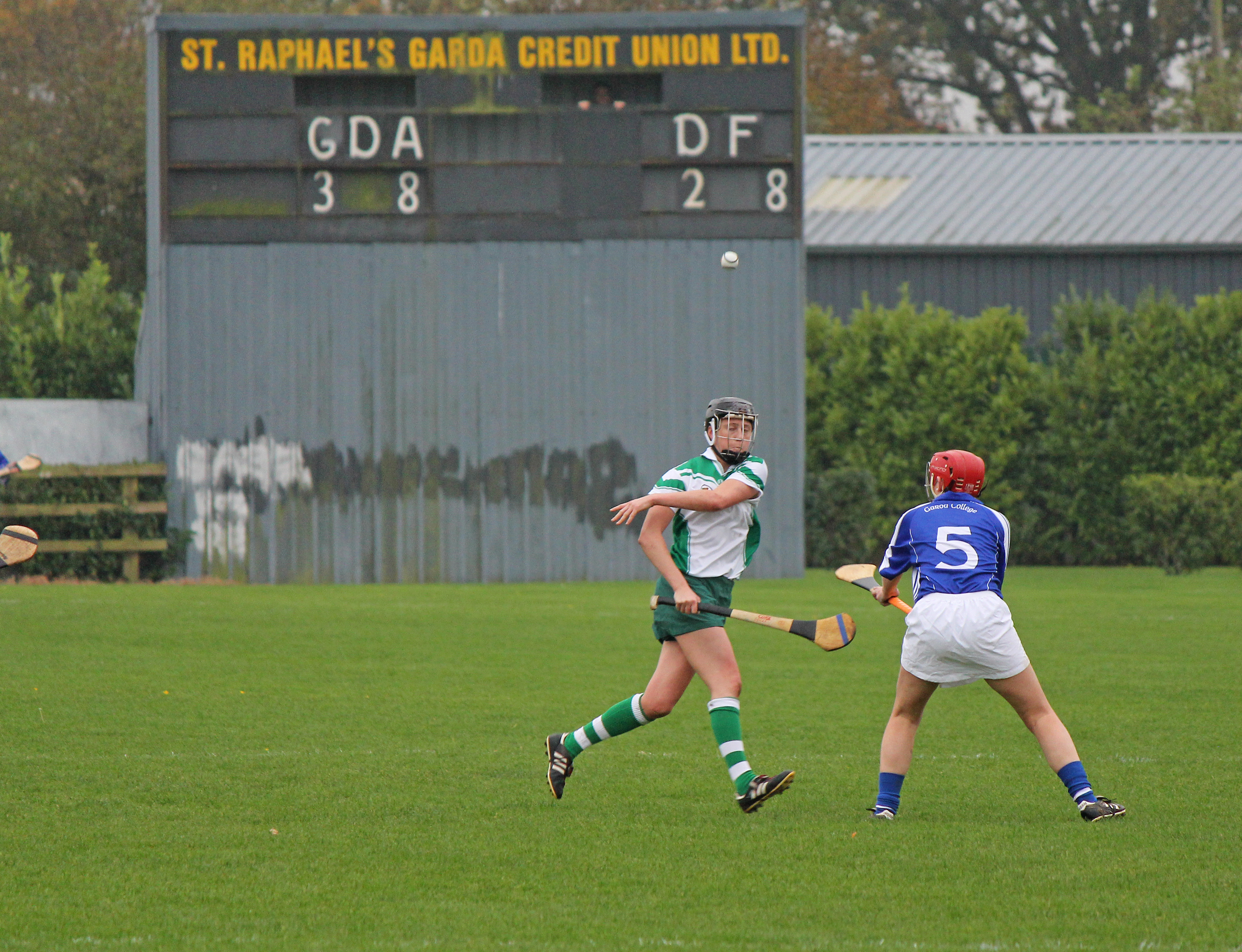 Camogie Game 24/10/12